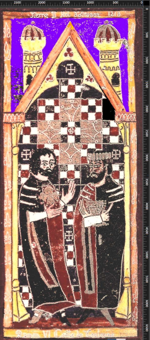 Raymond VI, comte de Toulouse rend hommage à Pierre II d'Aragon. Enluminure 140x55 mm, en ma propriété.